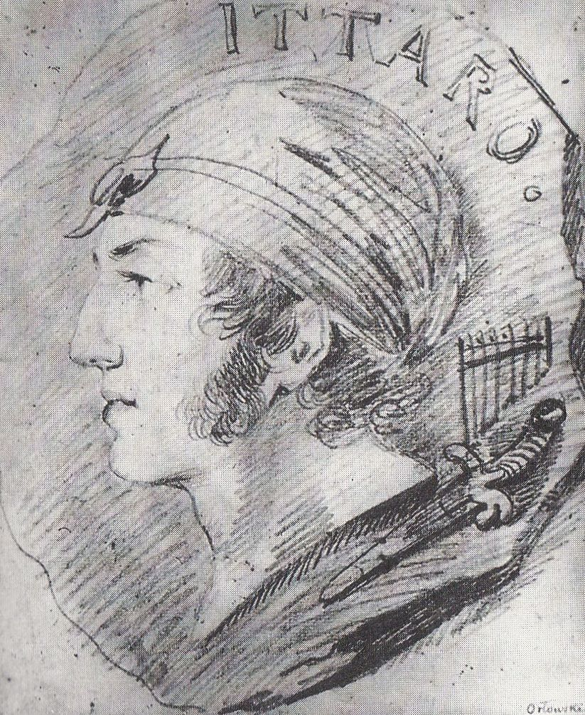 Henryk Ittar, architekt włoski